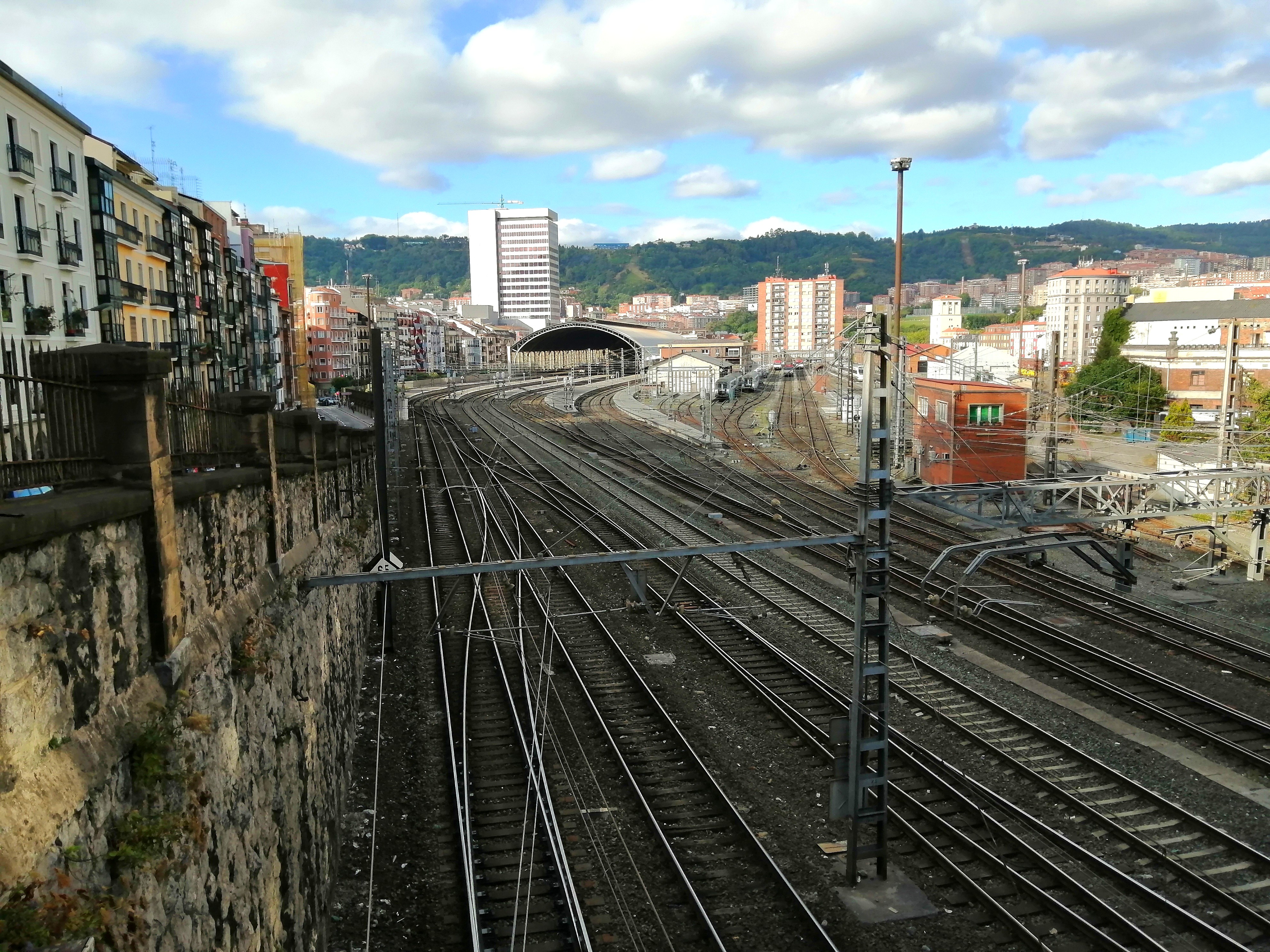 Abandoko geltokia, San Frantzisko kaletik ikusita